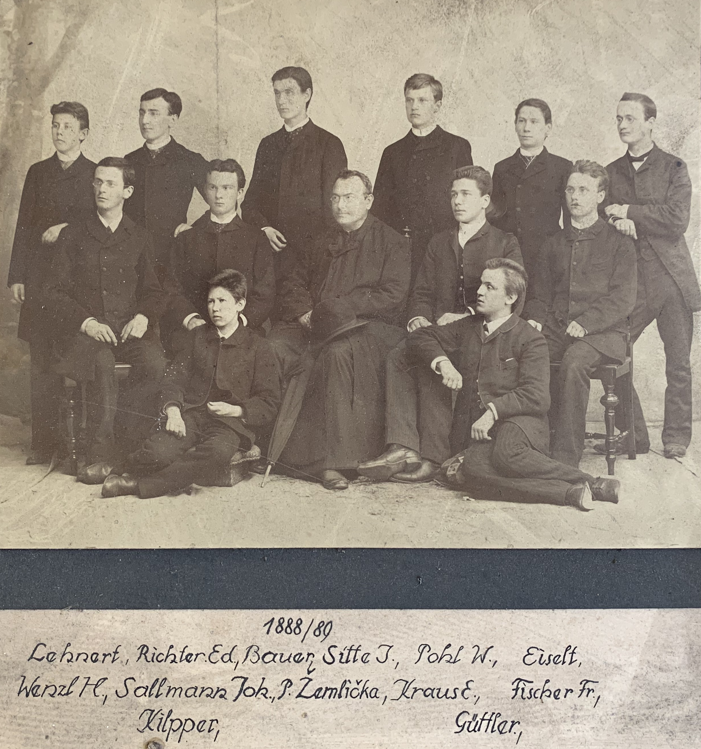 Tzv. Malý či chlapecký seminář v Bohosudově, tablo z let 1888-1889, uprostřed se nachází jezuita P. Žemlička SJ